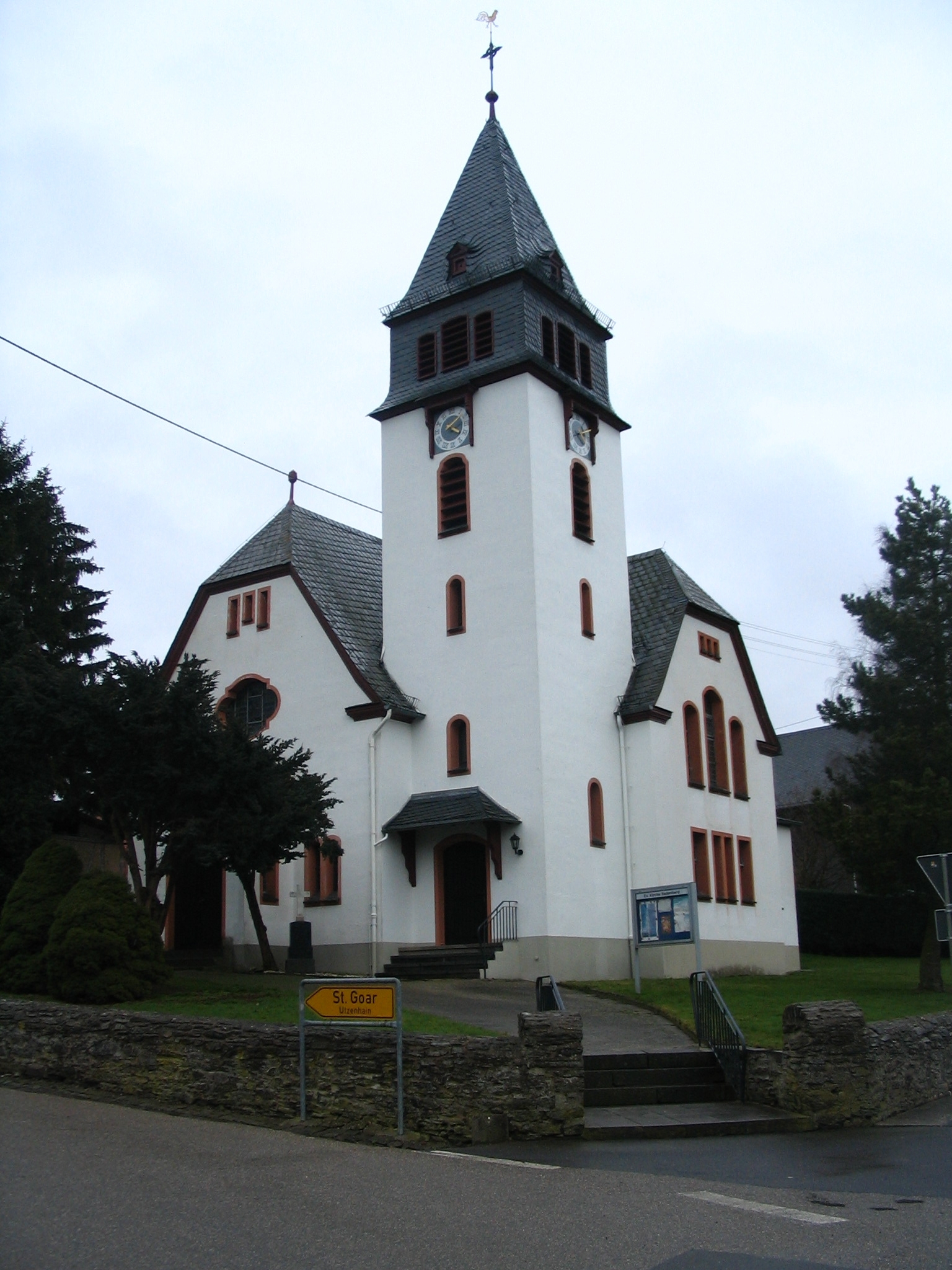 ev. Kirche von Badenhard im Hunsrück